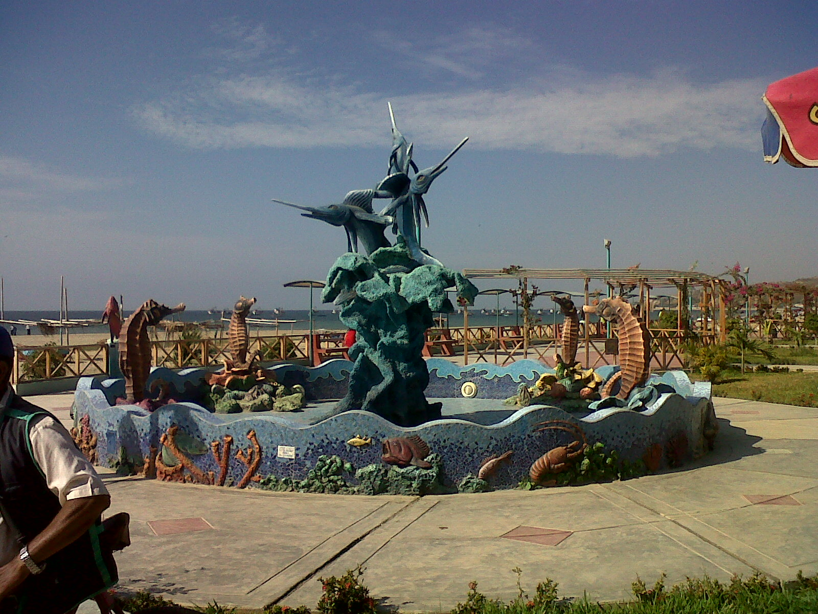 monumento al trabajo del mar